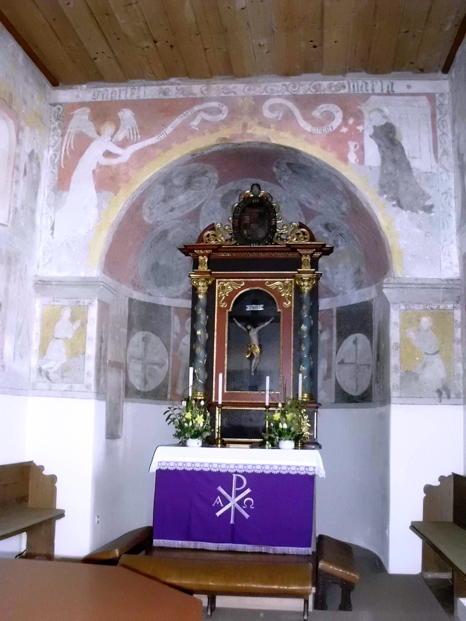 Evang.-Luth. Pfarrkirche St. Michael in Pfofeld im Landkreis Weißenburg-Gunzenhausen, Altar und Apsis-Fresken